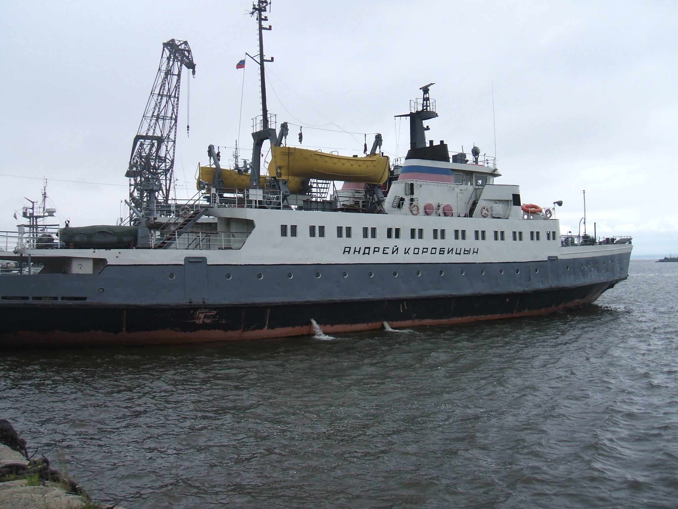 Корабль "Андрей Коробицын" на причале Кронштадта